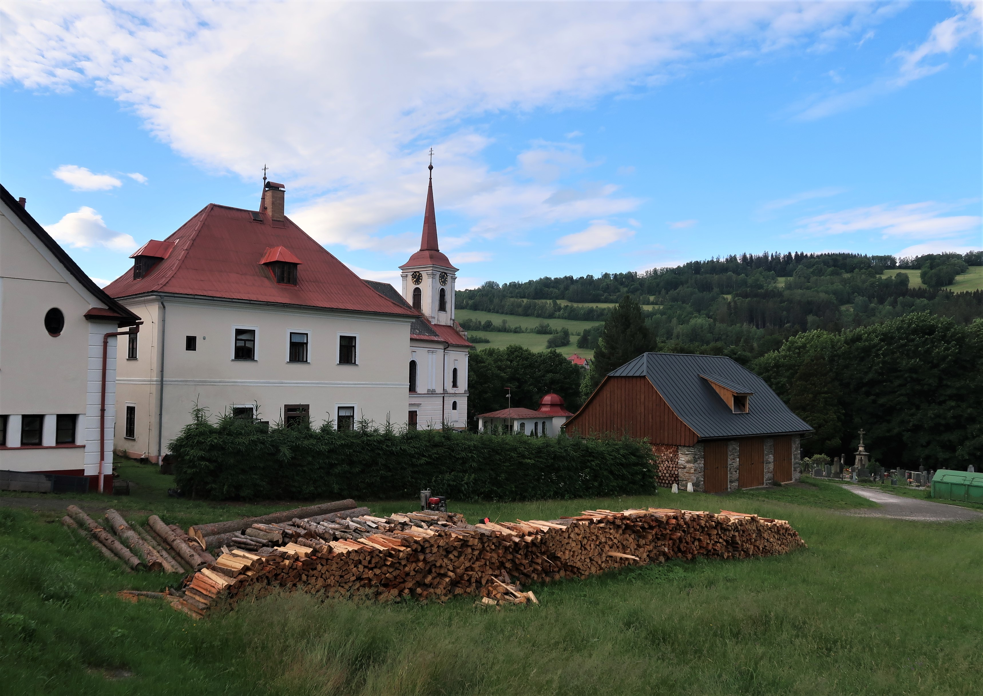 Klasicistní budova fary (1813) a kostel sv. Prokopa v Jablonci nad Jizerou